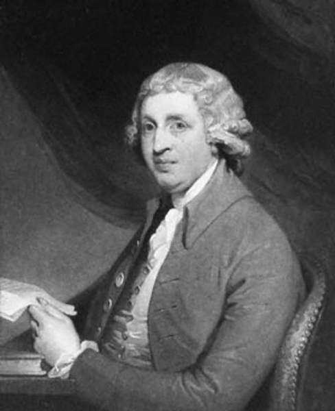 John Beresford (1738-1805)